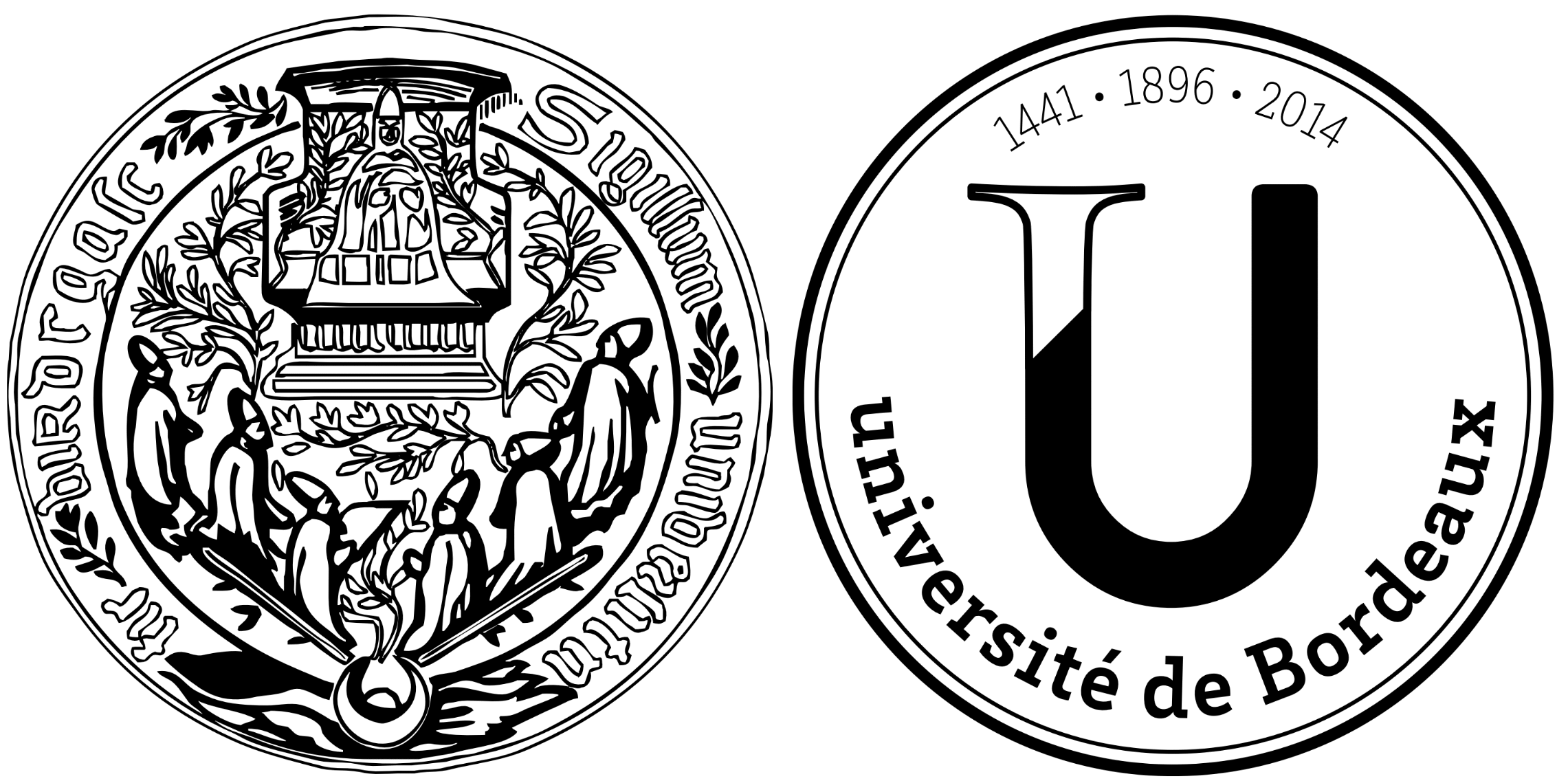 Sceau de l'ancienne Université de Bordeaux (voir [1] pour le sceau). « L’archevêque Pey-Berland délivrait les diplômes en apposant le sceau de l'Université, qui sera utilisé de 1441 à 1793. » (Études Offertes à Pierre Jaubert 1992)